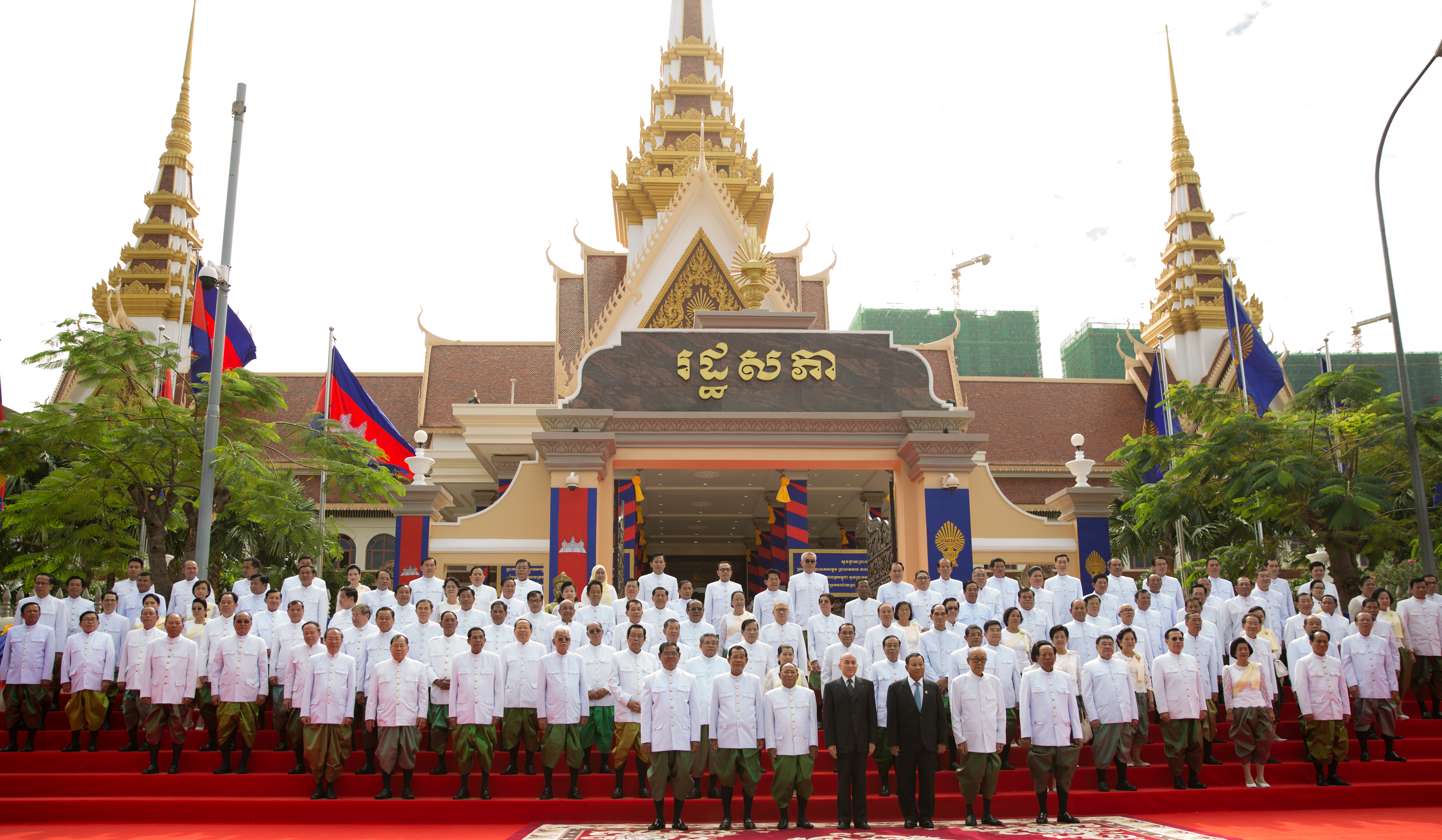 ភាសាខ្មែរ: តំណាងរាស្រ្តរបស់គណបក្សប្រជាជនកម្ពុជា ទាំង១២៥រូប ថតរូបអនុស្សាវរីយ៍ជាមួយ ព្រះមហាក្សត្រ ព្រះករុណា ព្រះបាទ នរោត្តម សីហមុនី នៅ ក្នុងសម័យប្រជុំពេញអង្គលើកទី១ នីតិកាលទី៦ នៅព្រឹកថ្ងៃពុធទី០៥ កញ្ញា ឆ្នាំ ២០១៨។